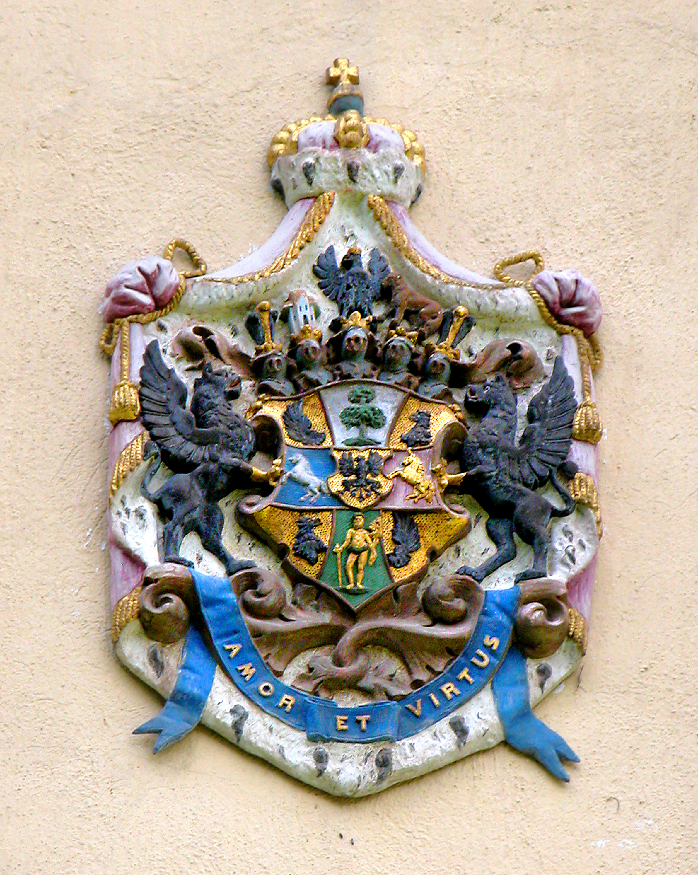 13.05.2015 03042 Branitz (zu Cottbus): Fürst-Pückler-Park Branitz: Wappen am Kavaliershaus. [DSCN5607.JPG]20150513390DR.JPG(c)Blobelt